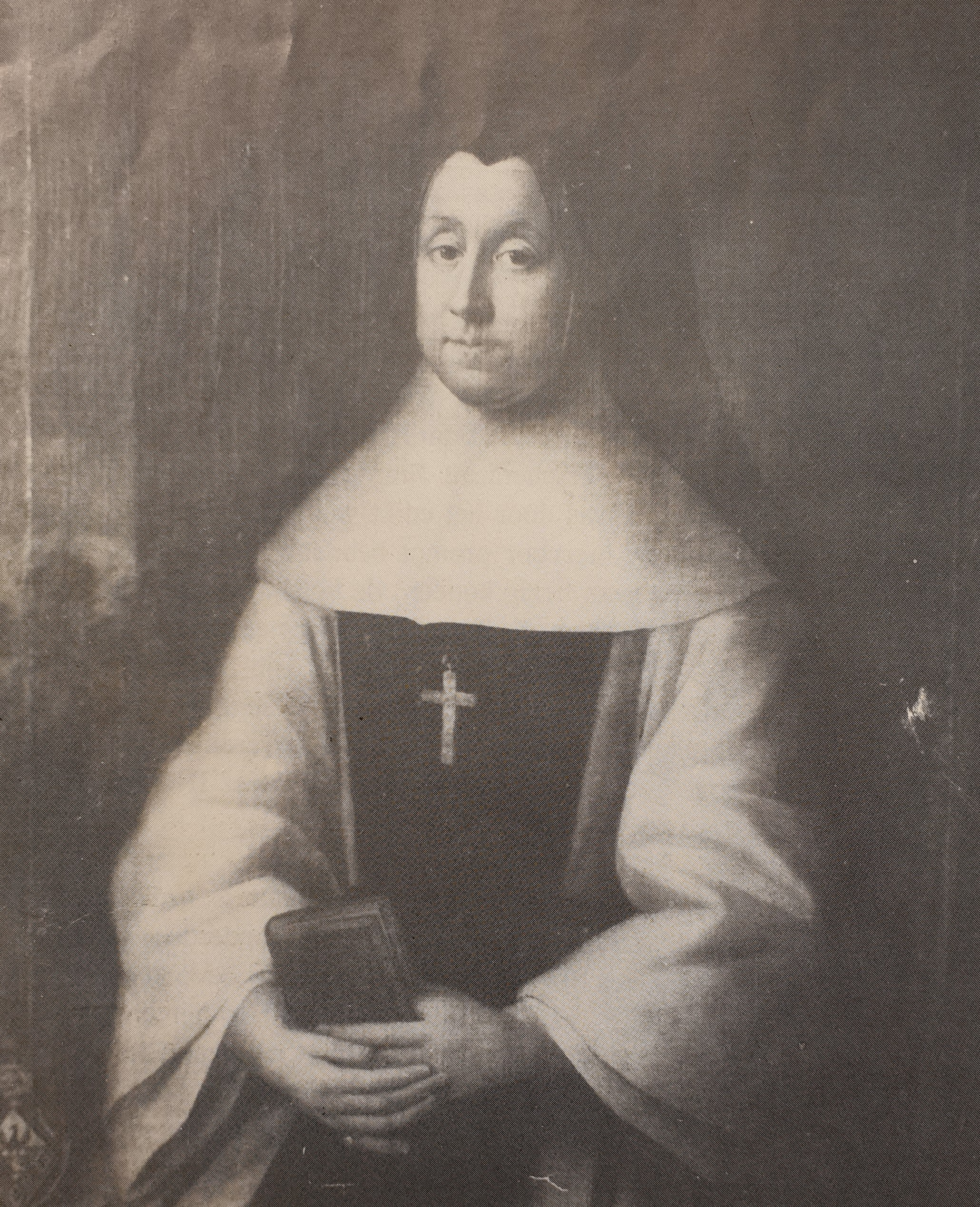 Portret van Abdis Patin uit de Guldenbergabdij van Wevelgem